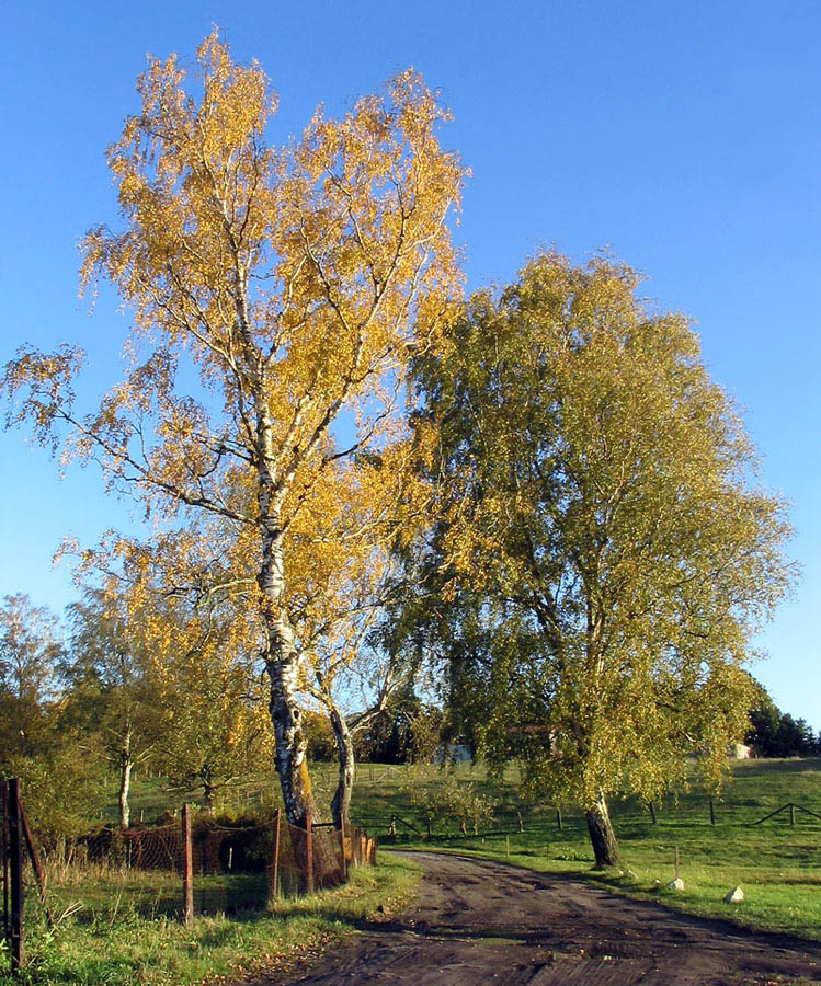 Birken im Herbst